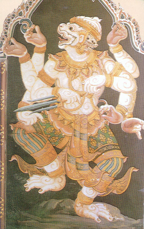 Hanuman. Photocopy of mural painting in Wat Phra Kaeo, Bangkok. Taken in 2007.